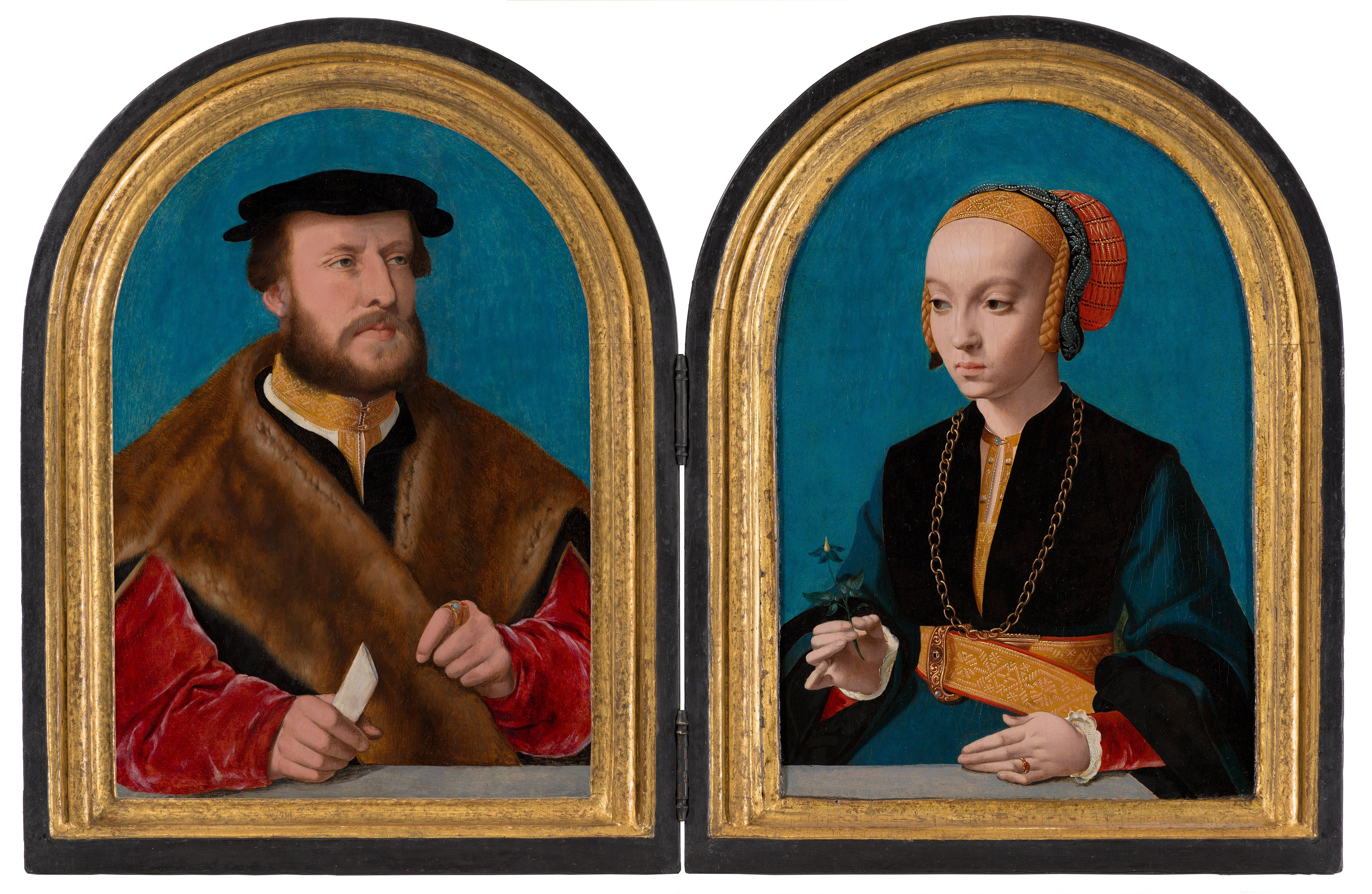 Elisabeth Bellinghausen en haar verloofde Jacob Omphalius, diptiek door Bartholomäus Bruyn.